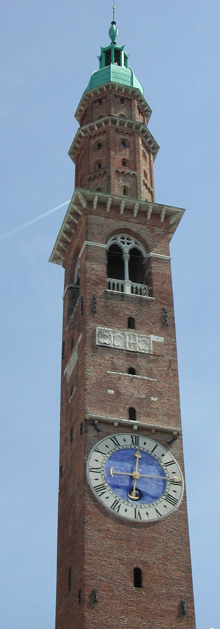 Torre di Piazza a Vicenza Source: photo uploaded by User:RicciSpeziari. Photographer: Riccardo Speziari